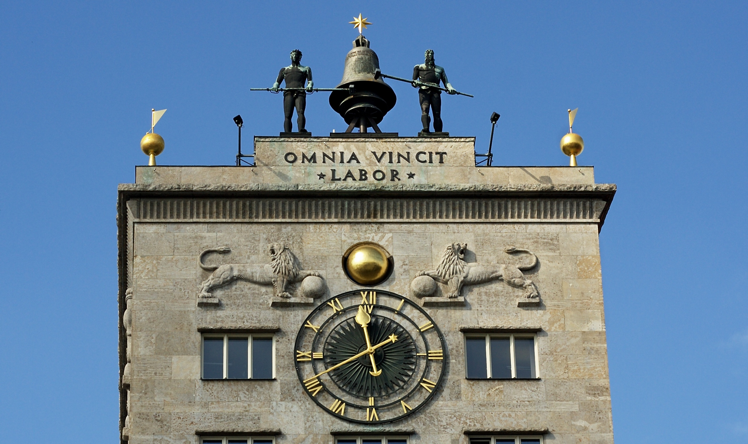 Die Klockenmänner am Kroch-Hochhaus in Leipzig, 2010.